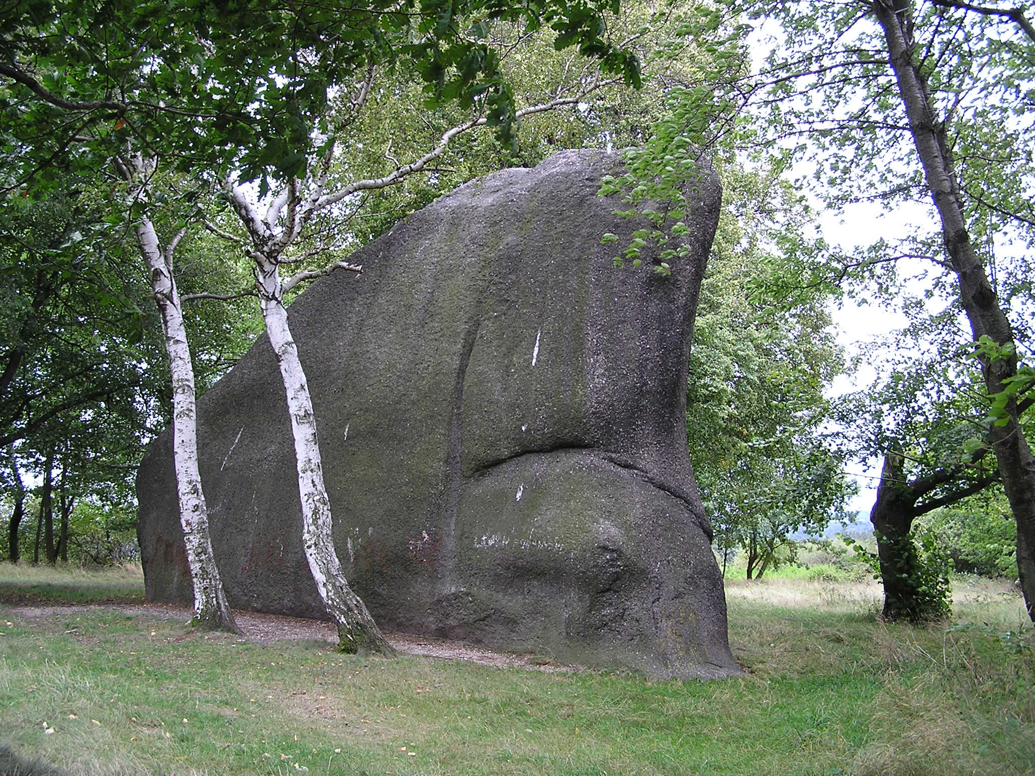 Klepec